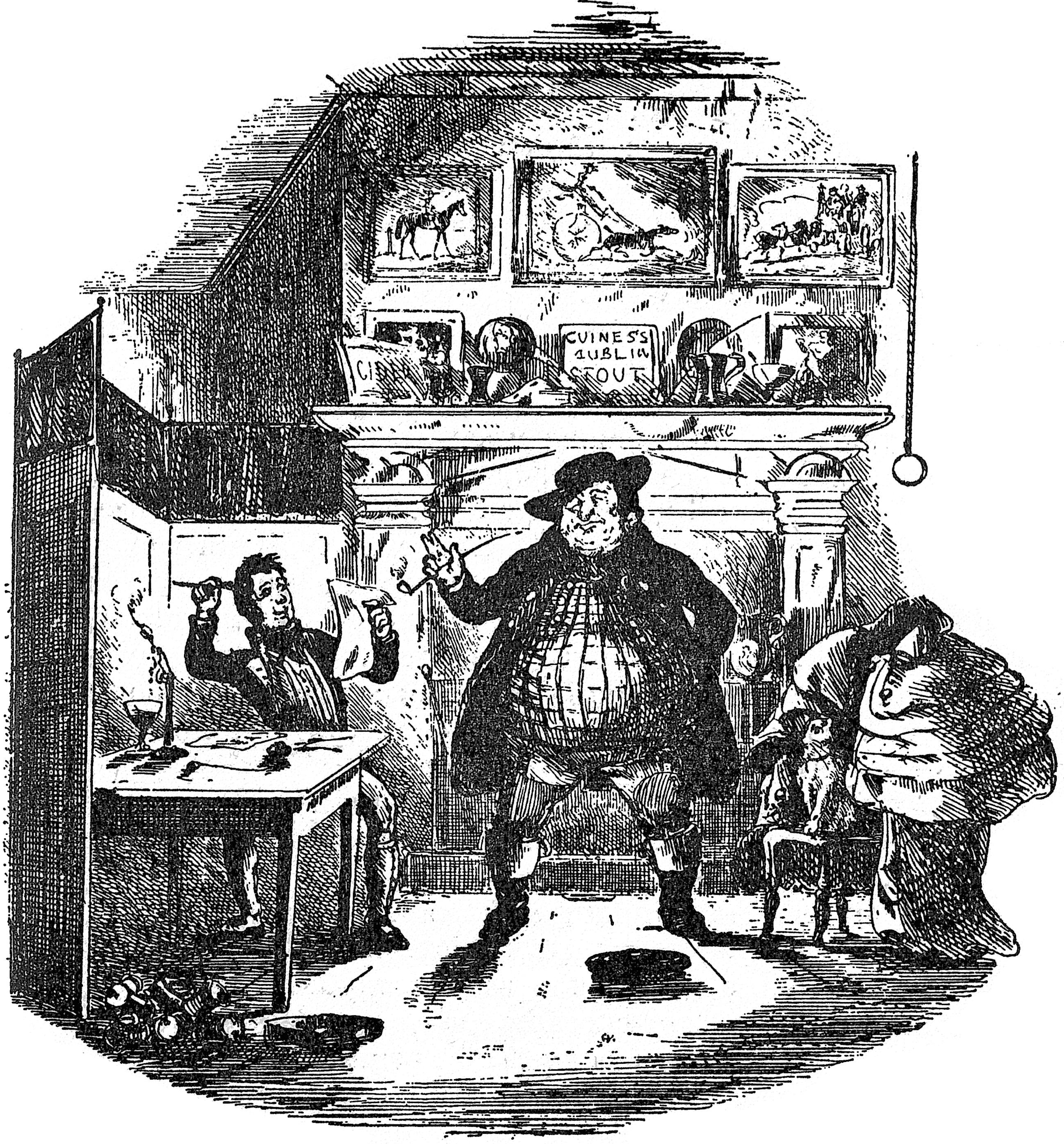 Иллюстрация Физа 1836 года к 30-й главе романа Диккенса Посмертные записки Пиквикского клуба